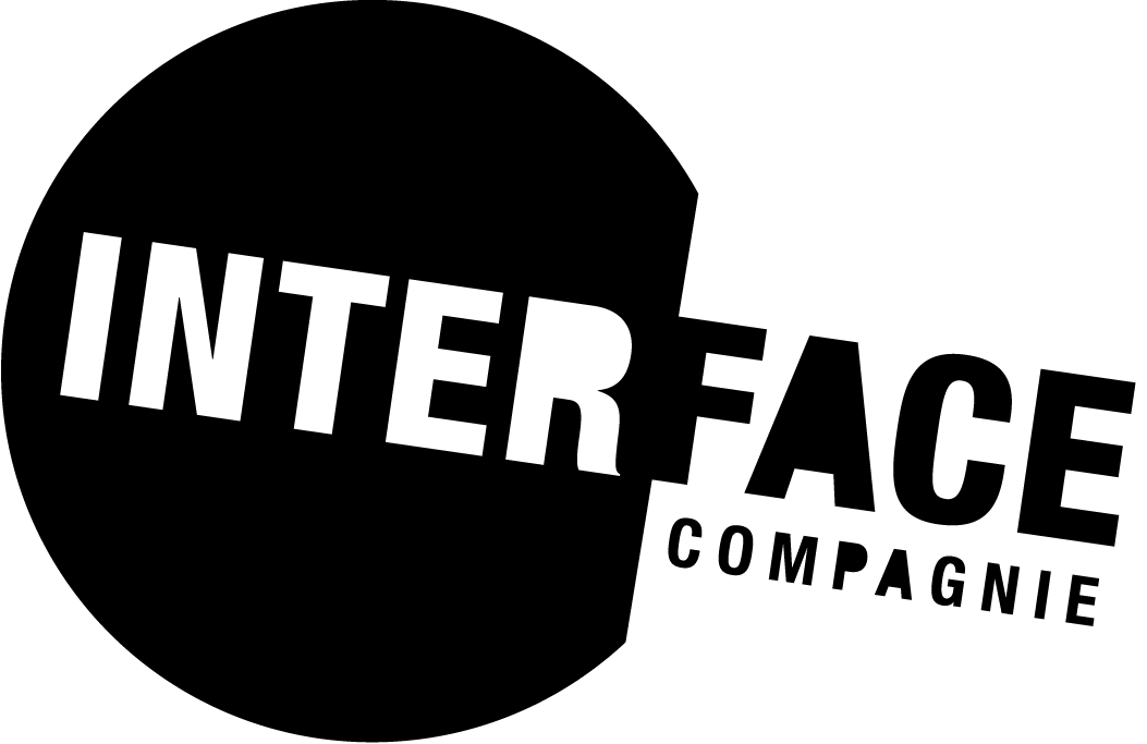 Logo Compagnie INTERFACE